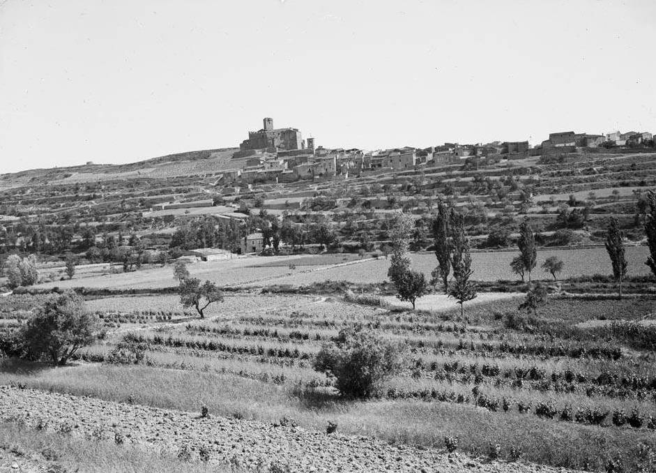 Imatge